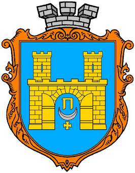 Герб міста Підгайці